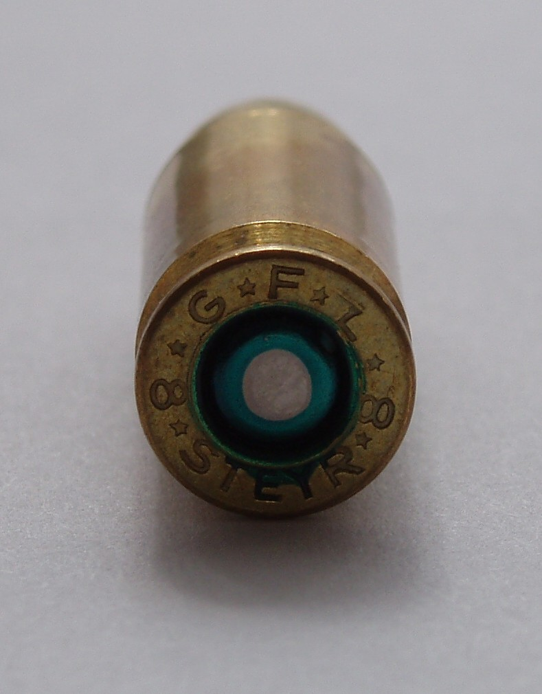 8mm Steyr cartrdige.FMJ bullet.